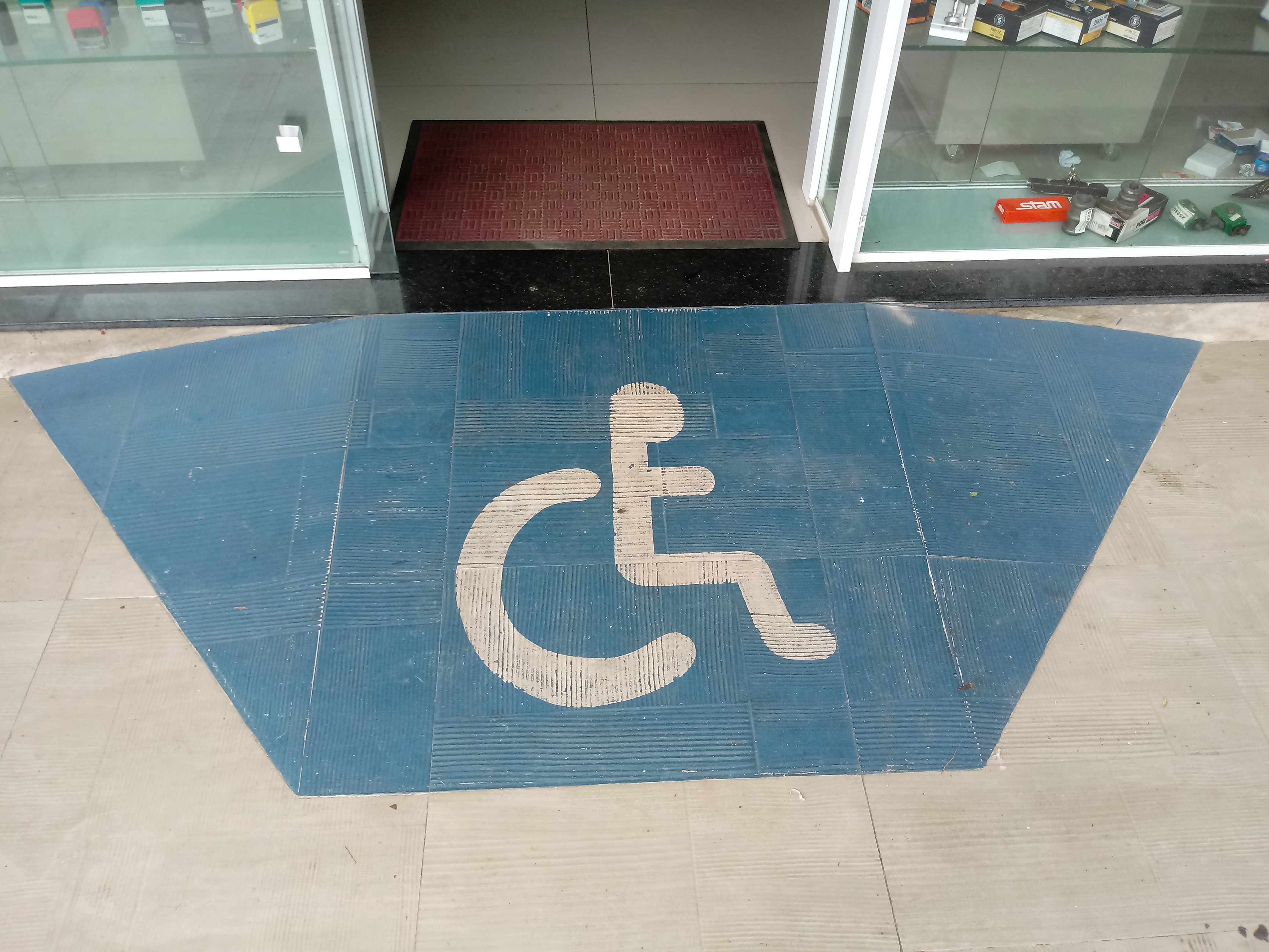 Rampa correta de calçada de cessibilidade urbana nuna loja na Praça Pedro II, em Teresina.